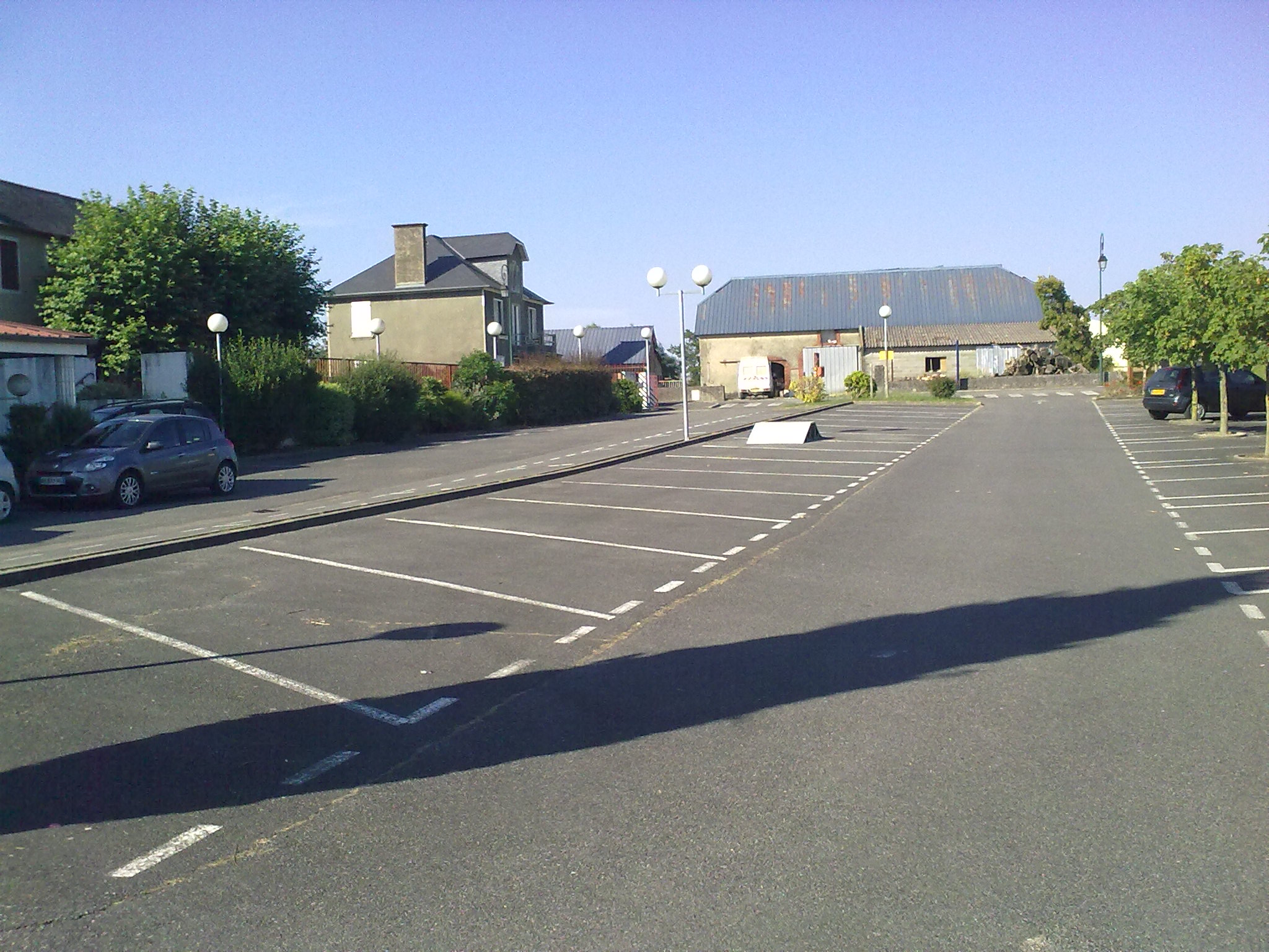 Place de la mairie et de la salle polyvalente d'Escoubès